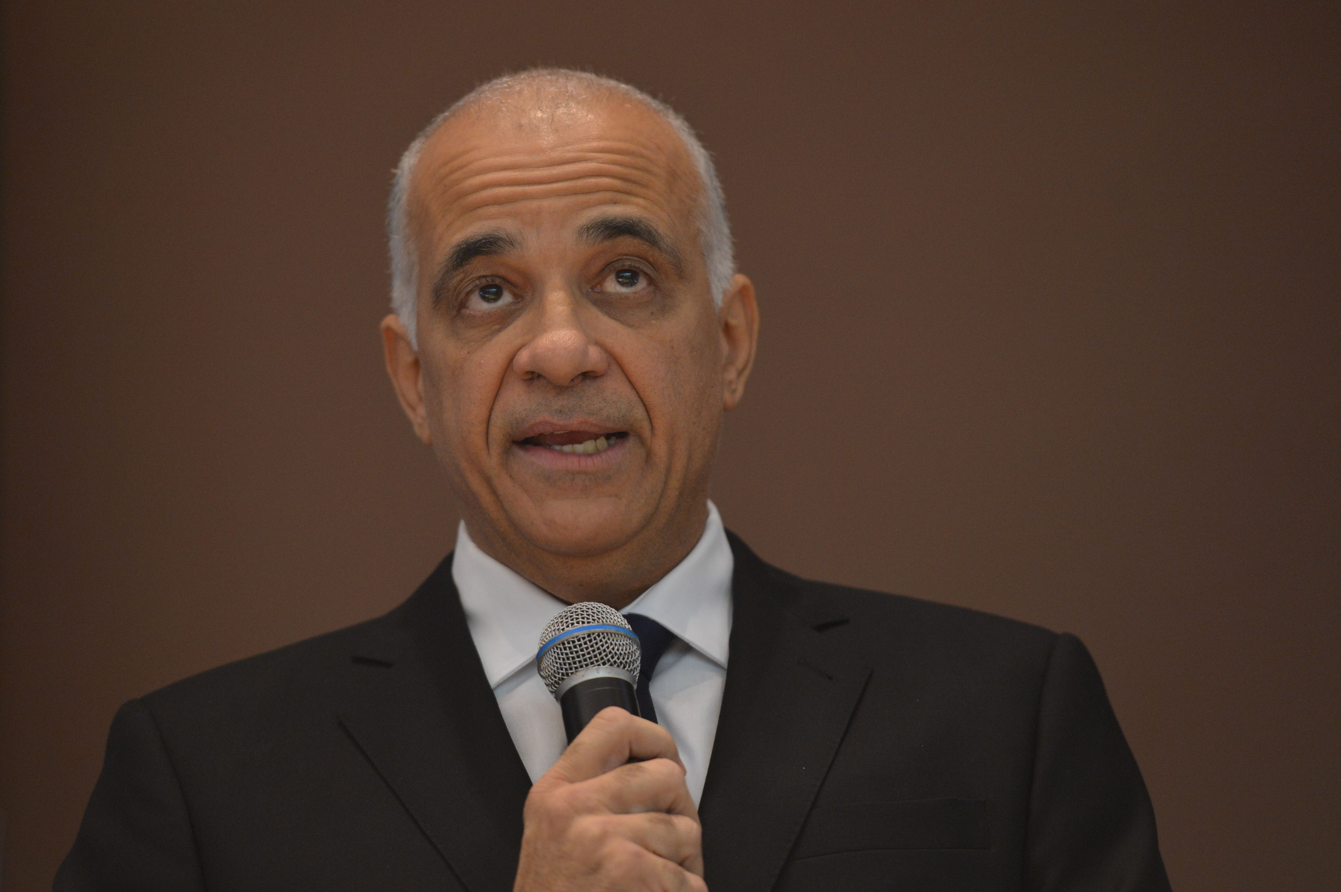 O presidente do Instituto de Pesquisa Econômica Aplicada (Ipea), Jessé de Souza, durante cerimônia de posse.